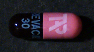 Prevacid 30mg